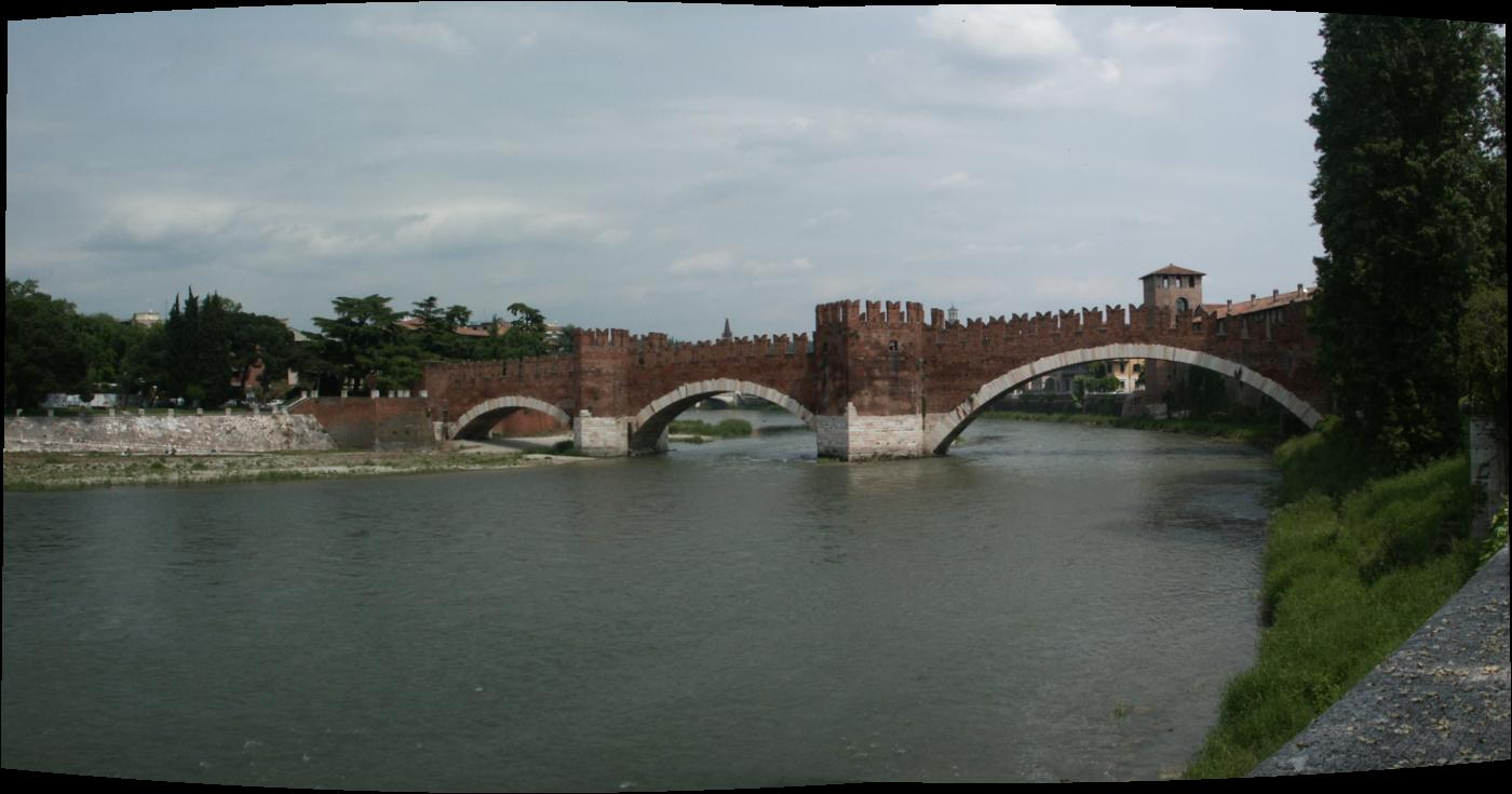 Castel Vecchio Verona, Italie Foto samengesteld uit 2 foto's en met Autostich bewerkt.